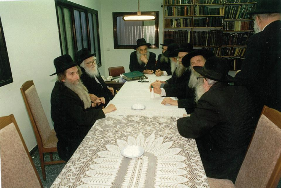 ישיבת מועצת גדולי התורה הראשונה של תנועת דגל התורה בתשמ"ט במעונו של מרן הרב שך לצידו של הרב שך מופיע הרב שטיינמן, נראים בתמונה גם הרב נסים קרליץ הרב משה שמואל שפירא הרב אברהם יעקב זלזניק הרב צבי מרקוביץ' והרב מרדכי מן